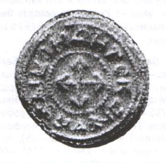 Пячатка Вайдылы